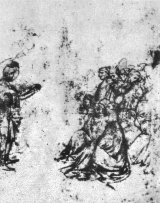 Pisanello, disegni, museo boymans van beuningen i.518